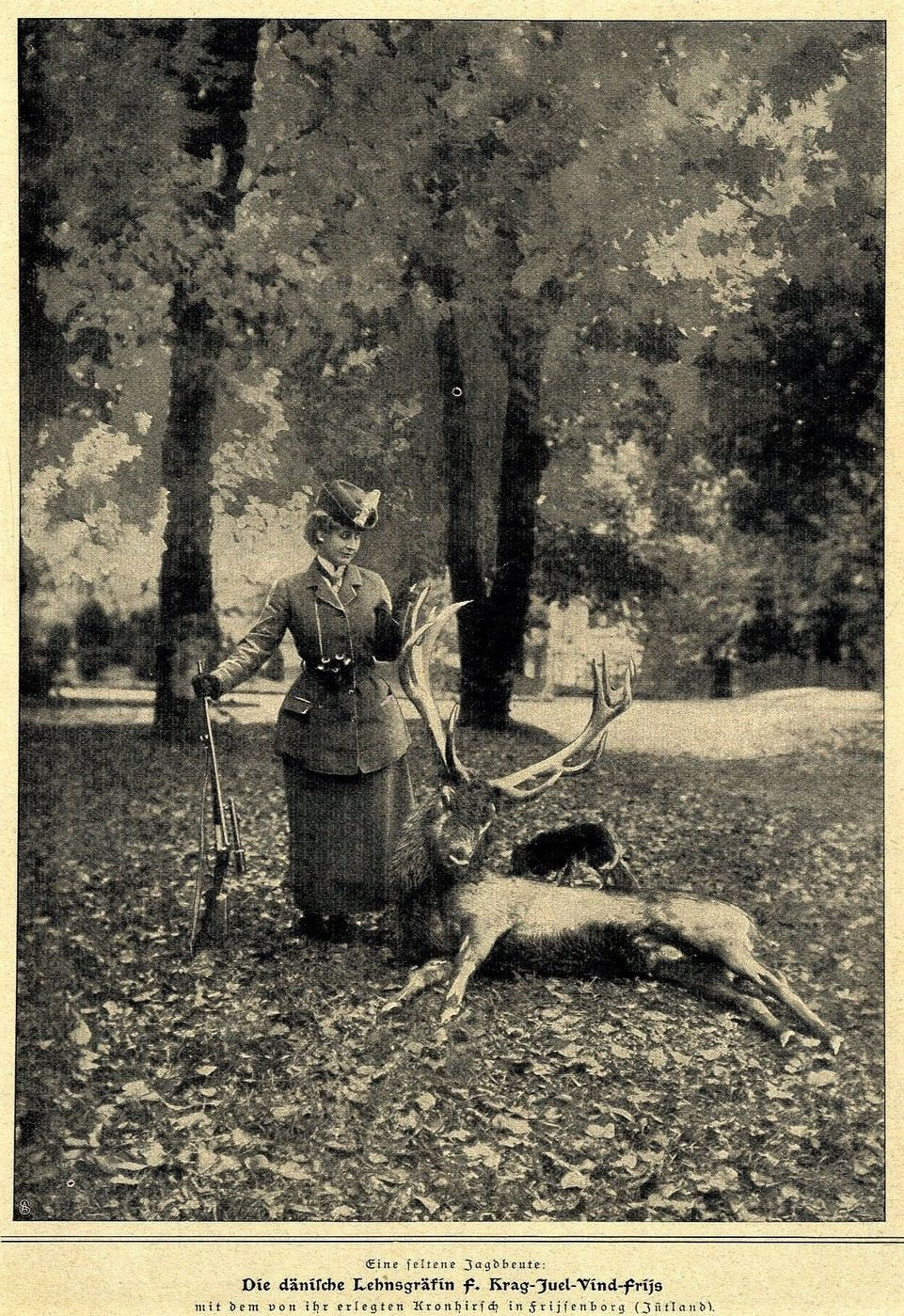 Die dänische Lehnsgräfin F. Krag-Juel-Vind-Frijs mit dem von ihr erlegten Kronhirsch in Frijsenborg, Jütland, 1904